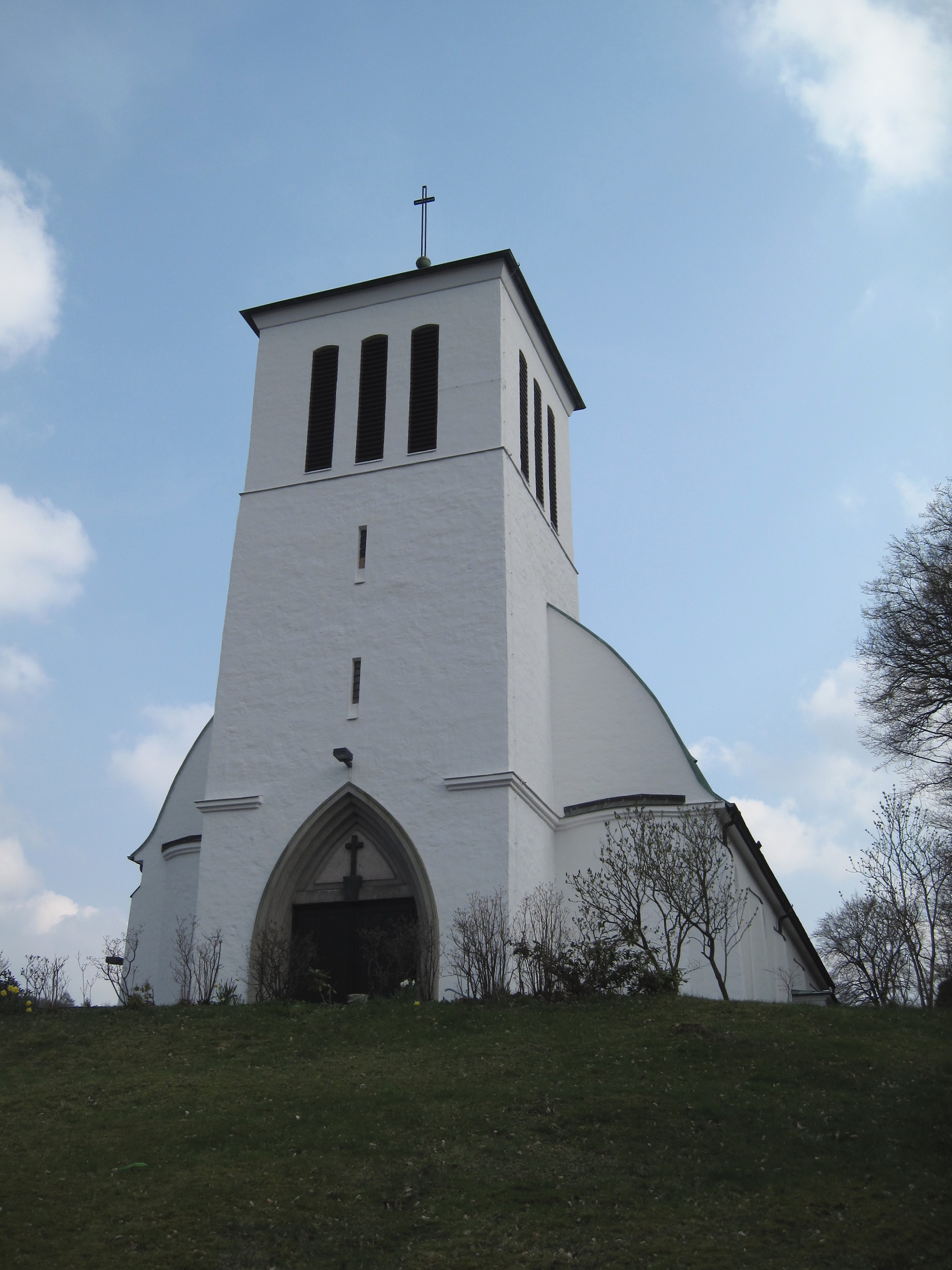 Katholische Kirche St. Petrus Canisius im Stadtteil Westig in Hemer.